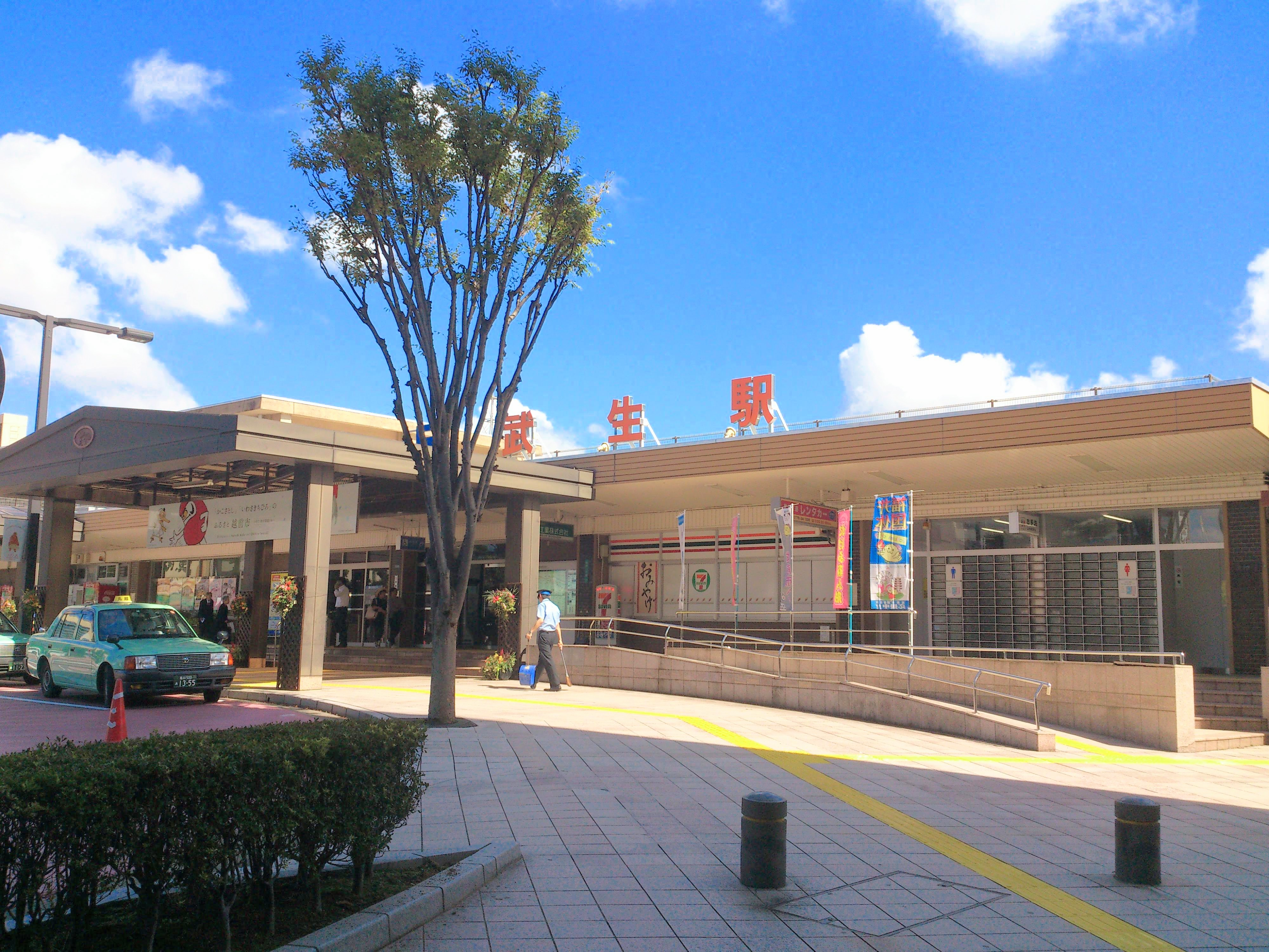 武生駅の駅舎